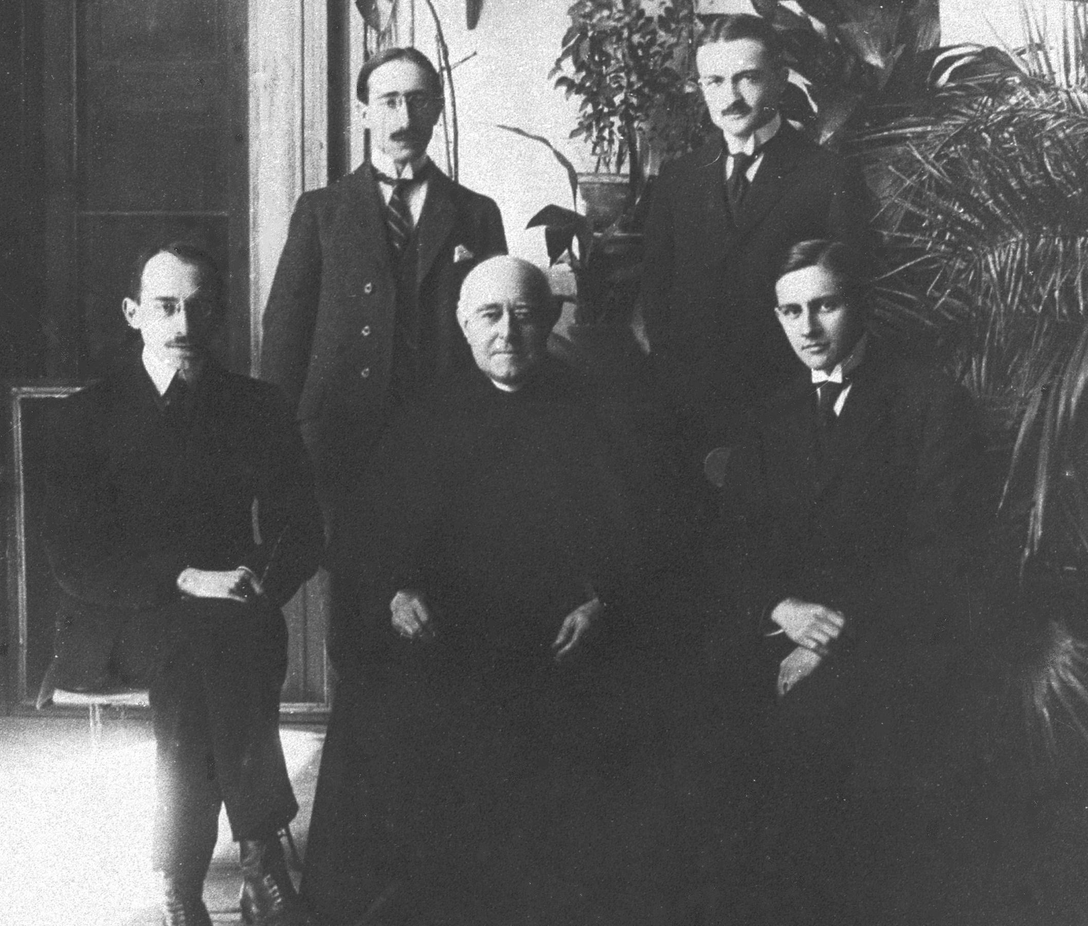 De gauche à droite : Louis Canet, Barthélémy-Amédée Pocquet du Haut-Jussé, Monseigneur Louis Duchesne, "C de Capezet" ?, Pierre de Cenival, en avril 1917